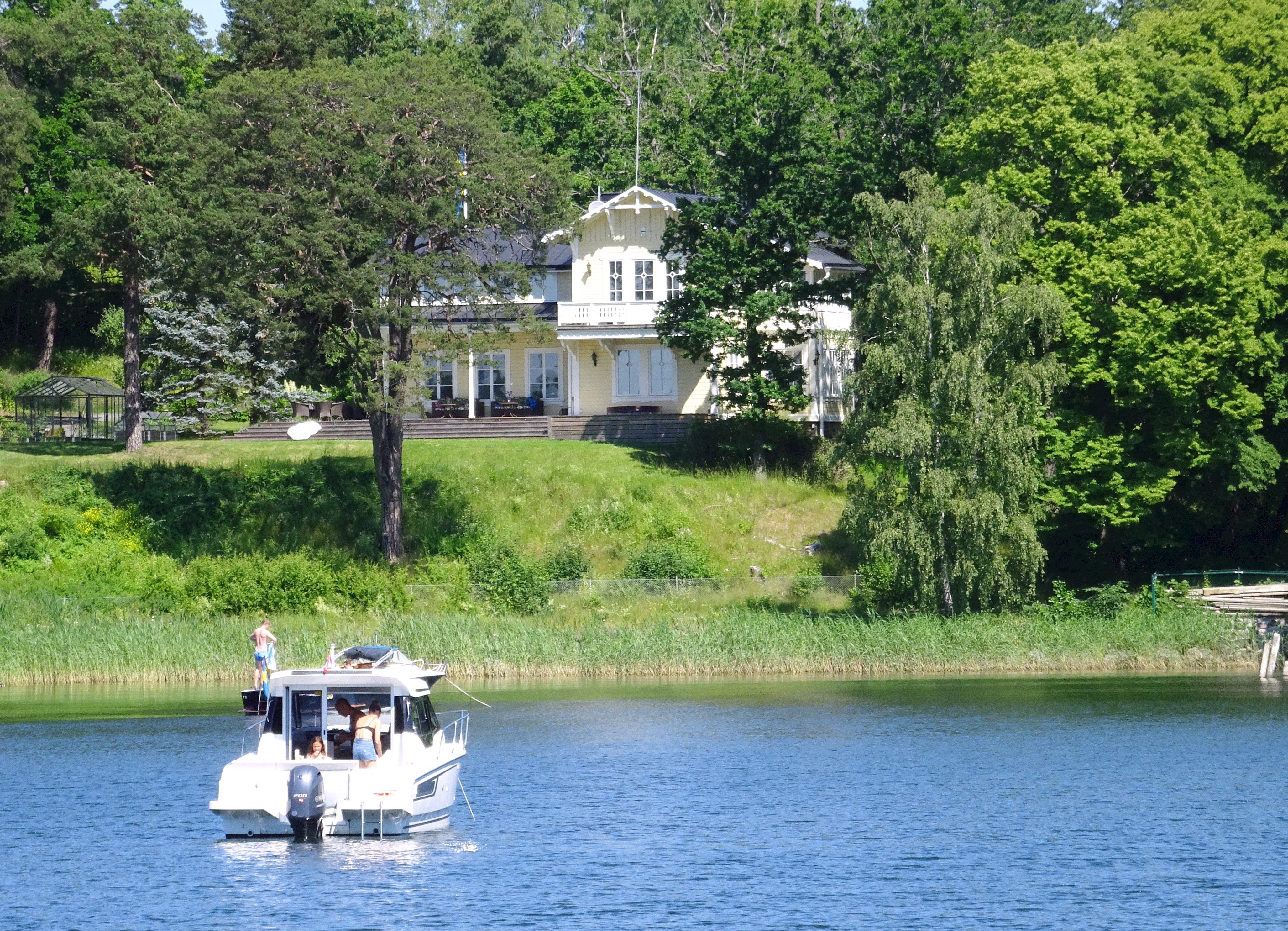 Villa Sofielund, Frescati, byggår ca 1870-1880